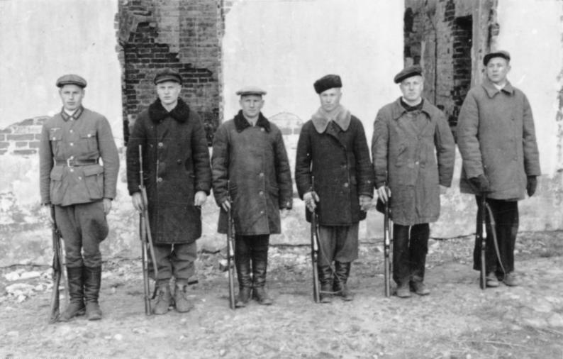 Mogilew, März 1943 Einheimische Miliz wird ausgebildet. Einsatzstab Reichsleiter Rosenberg für die besetzten Gebiete - Hauptarbeitsgruppe Ostland Film: 45/16